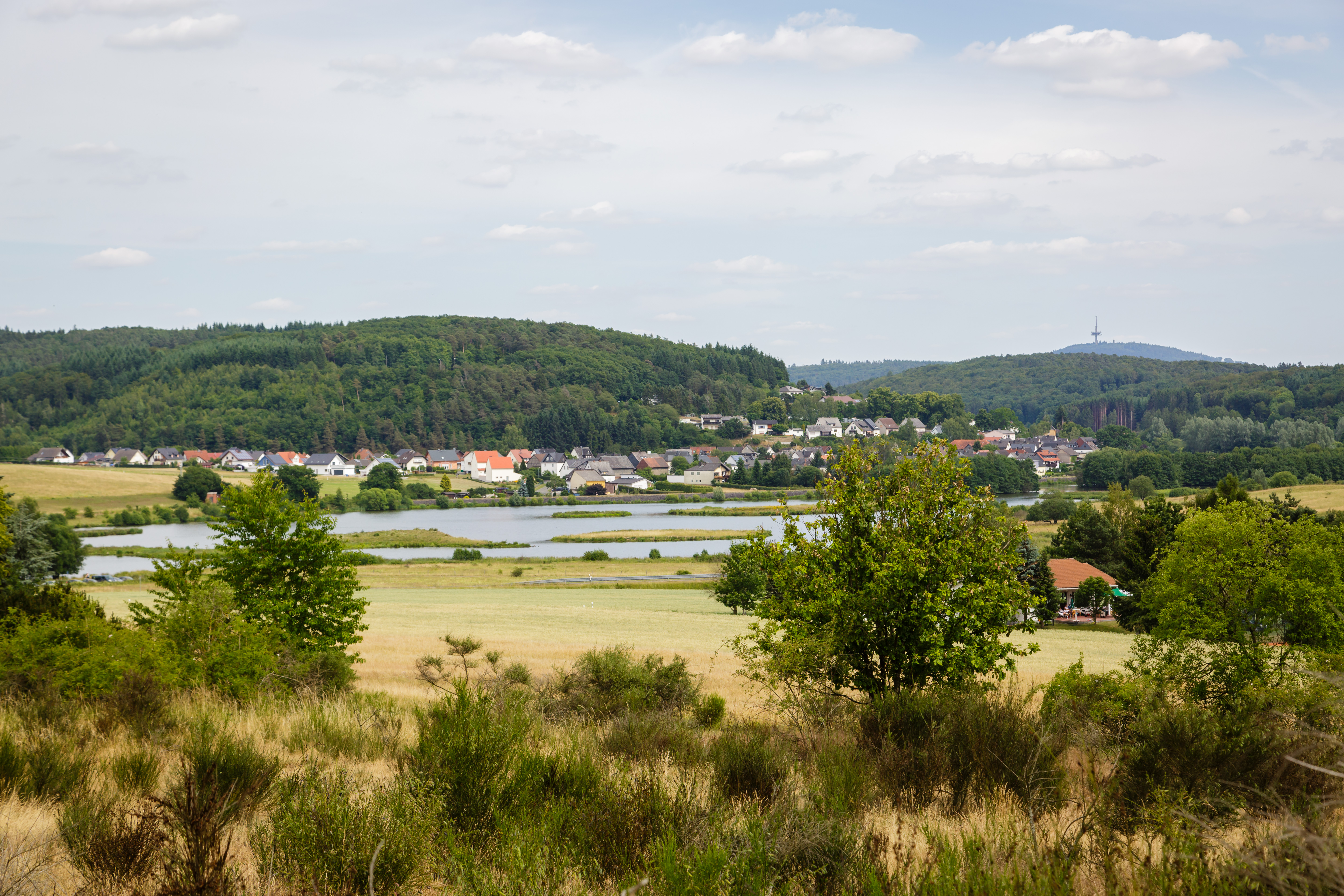 (NSG:HE-1532023)_Aartalsperre bei Mudersbach